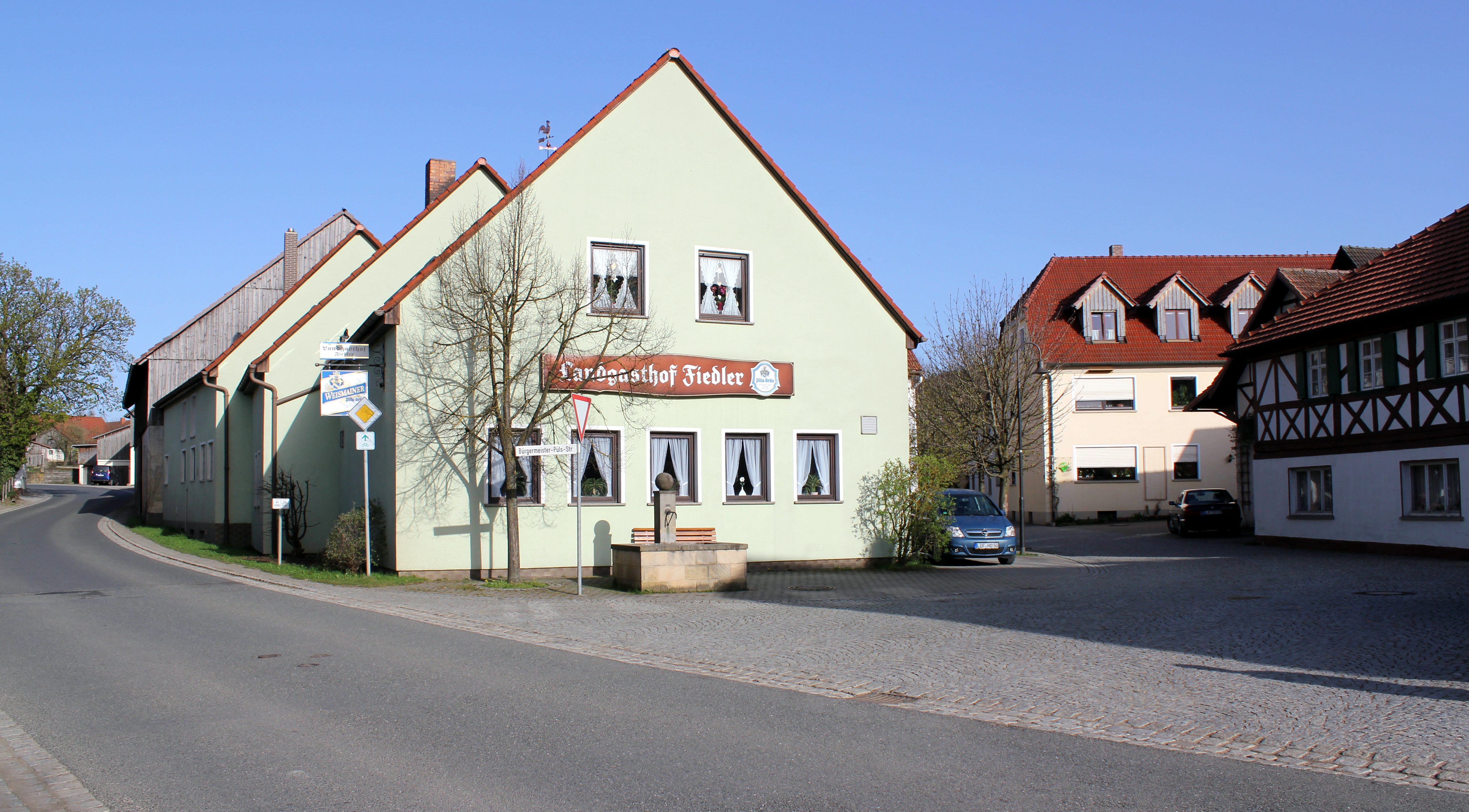 Dorfplatz und Gasthof Fiedler in Burkheim